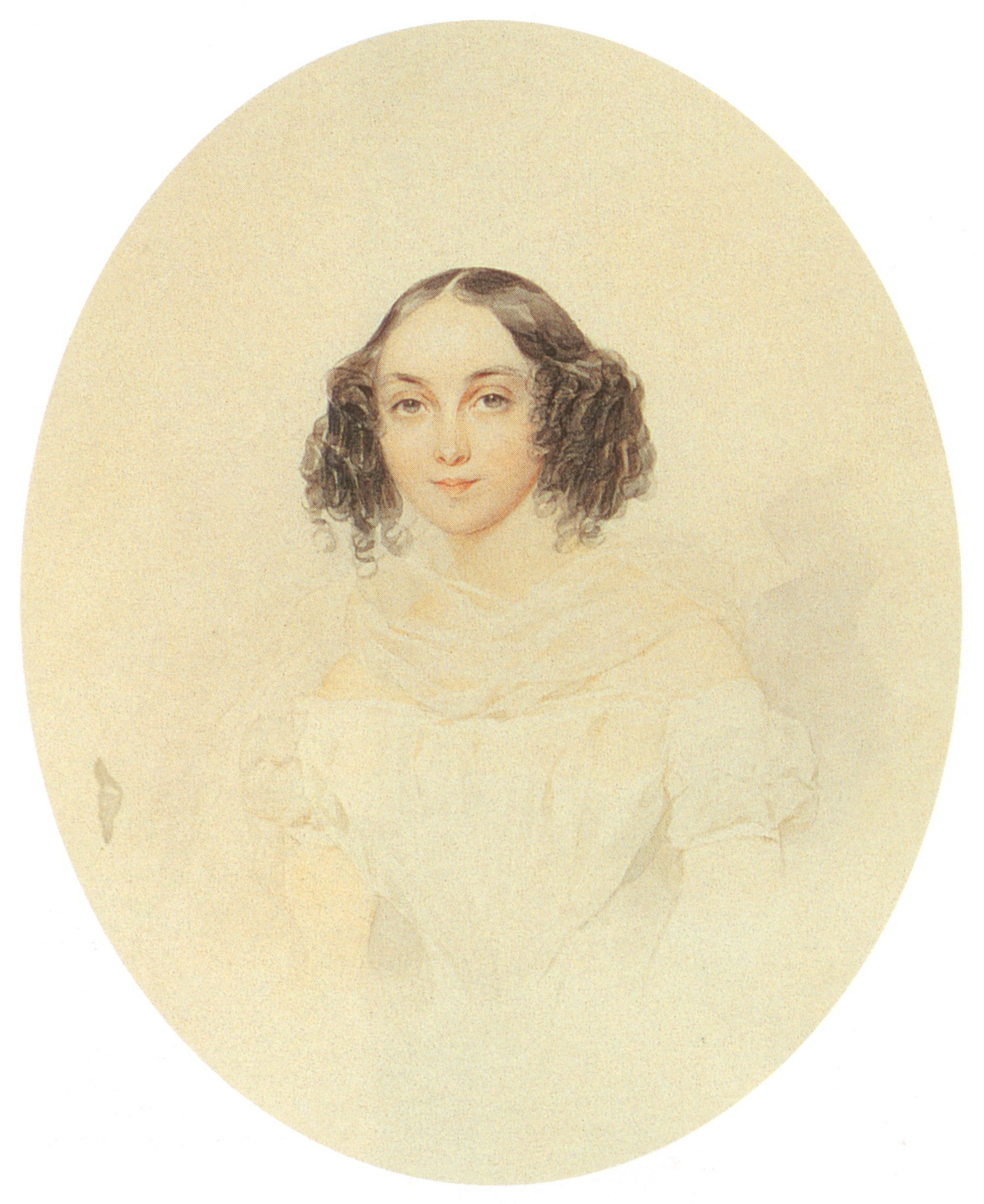 Елизавета Борисовна Пестель (1828—1914), дочь Б. И. Пестеля, в первом браке замужем за генералом Квицинским, во втором - за И. А. Арсеньевым.